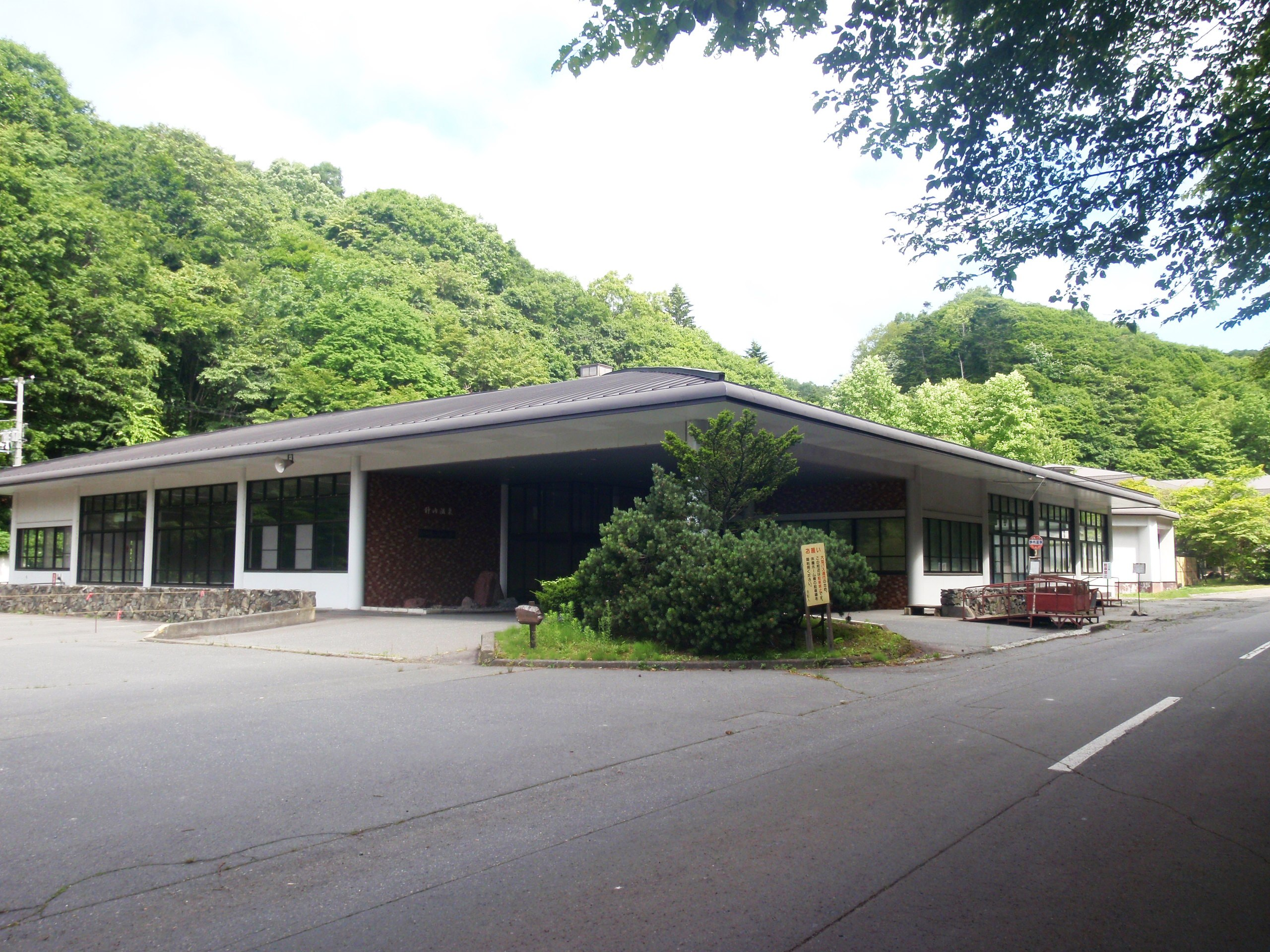 静内温泉